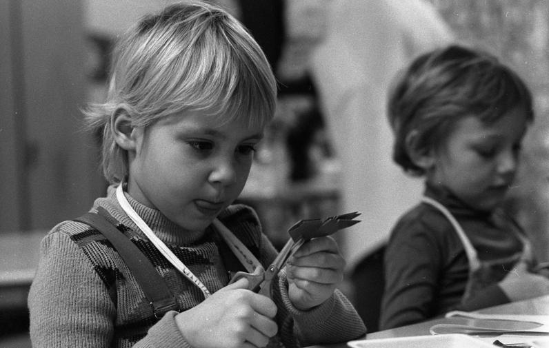 ADN-ZB/Lehmann/3.1.83/pe/Halle: Flink und mit viel Geschick bastelt die fünfjährige Dana Drews in ihrem Kindergarten. Basteln gehört zu den Lieblingsbeschäftigungen der Fünf- bis Sechsjährigen in der ältesten Gruppe des Kindergartens in Halle-Silberhöhe.